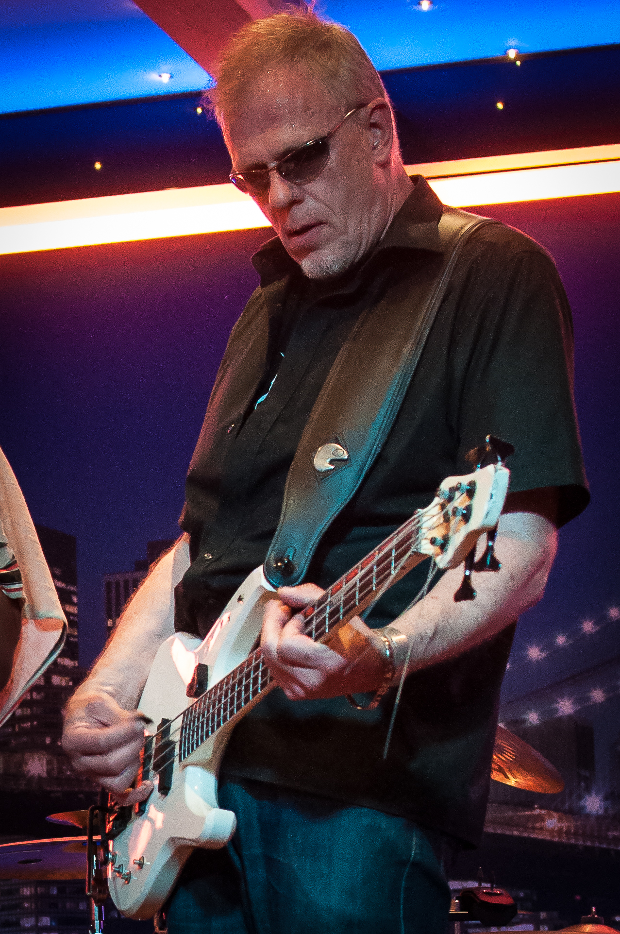 Hellmut Hattler in Fellbach 2014